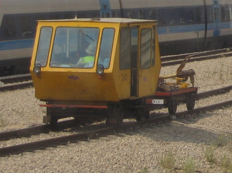 קרונית תחזוקה 742 של רכבת ישראל בתחנת לוד